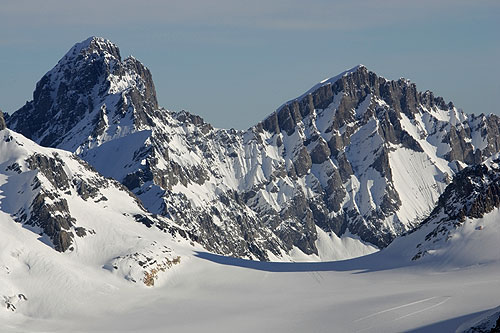 Gspaltenhorn: Blick hinunter zum Kanderfirn